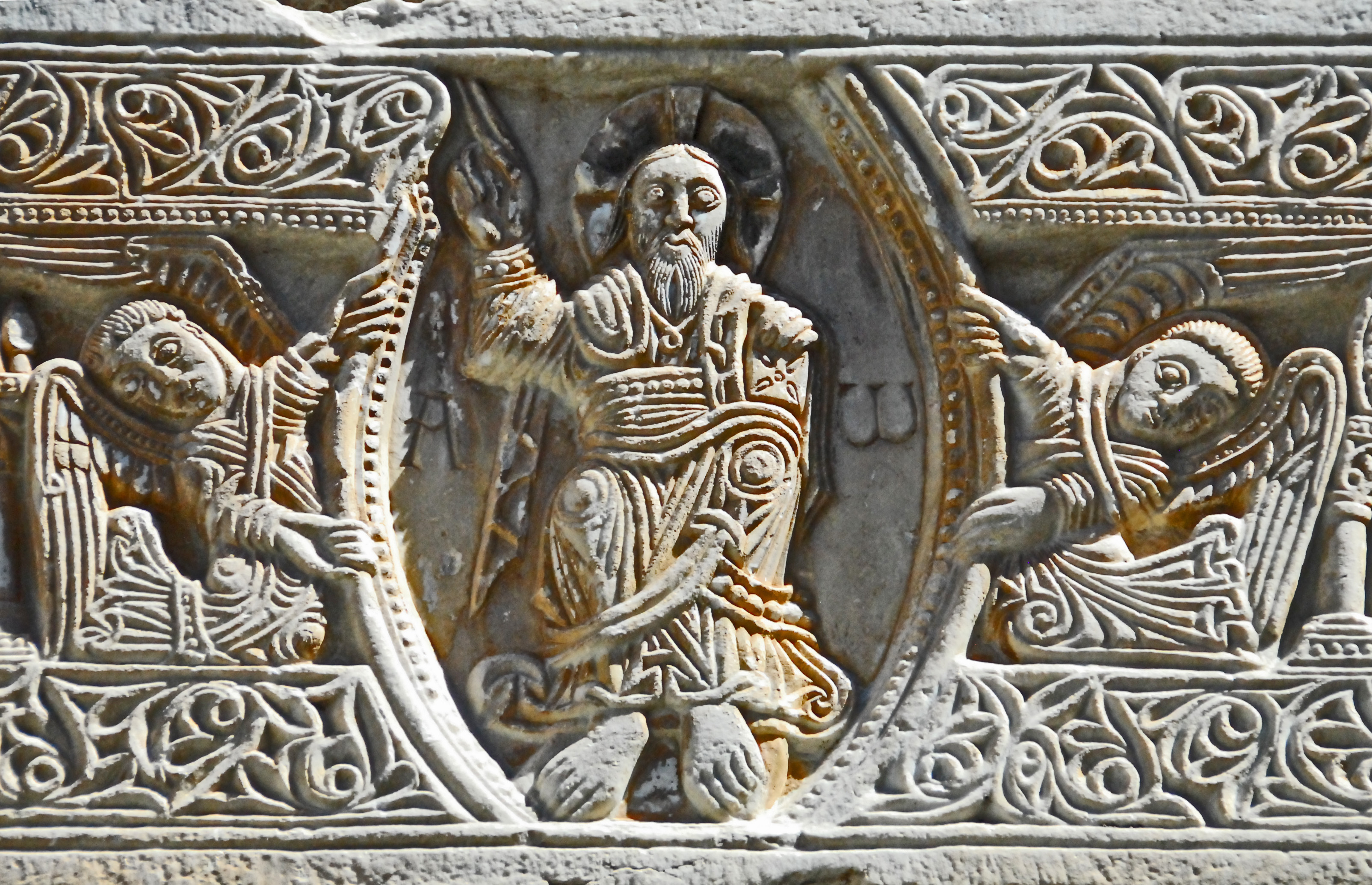 St-André-de-Sorède, Türsturz, Mitte